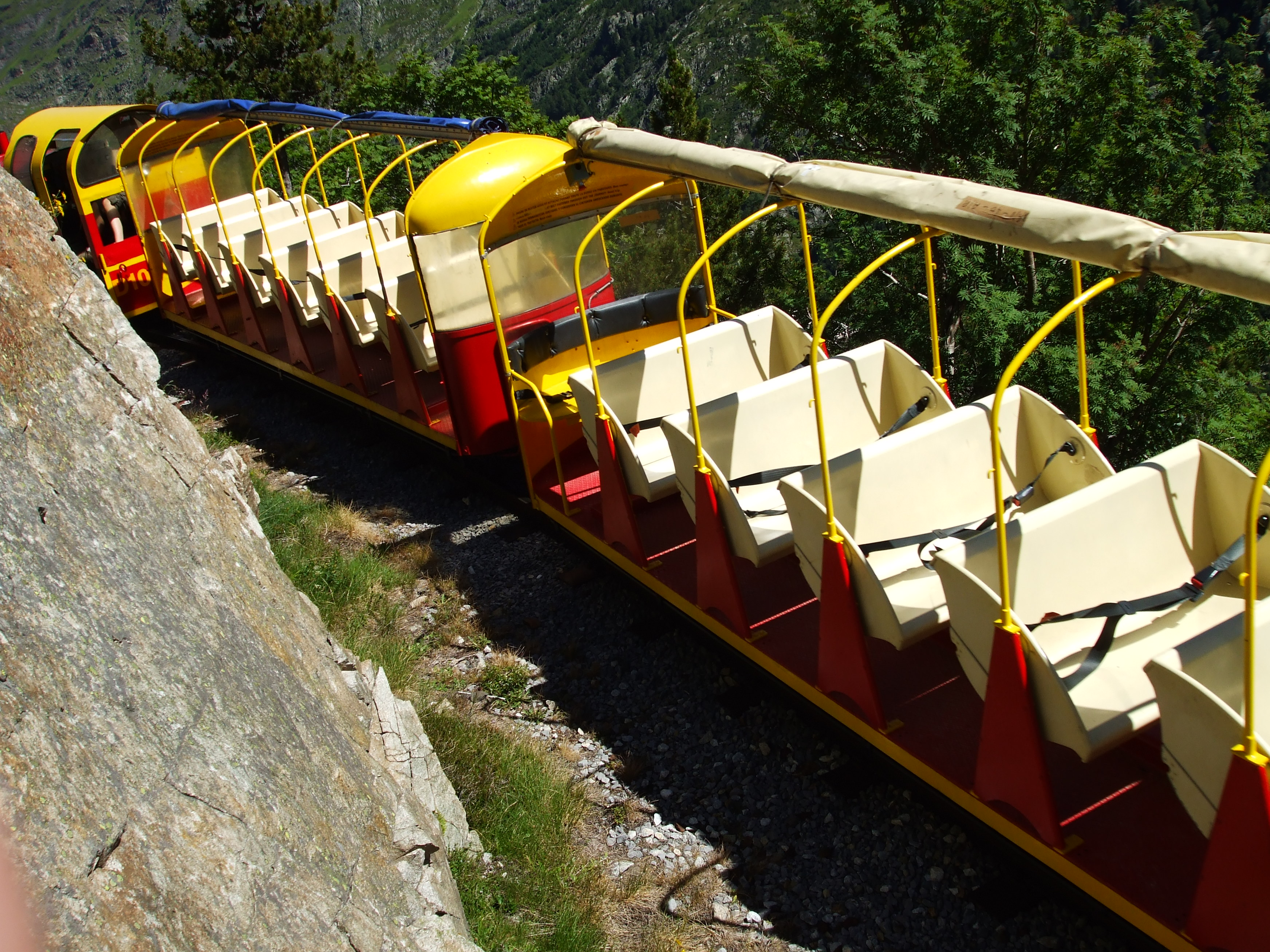 Le petit train qui parcourt 10 km au bord du ravin pour arriver au lac d'Artouste (Pyrénées)